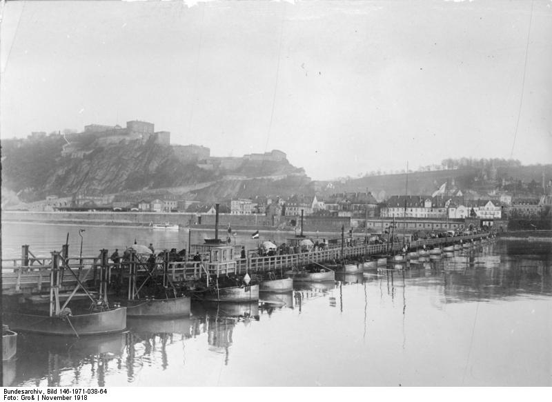 Heimkehr der deutschen Truppen nach dem Waffenstillstand: Rheinübergang über die Schiffsbrücke in Koblenz, Nov. 1918. (Im Hintergrund die Festung Ehrenbreitstein)